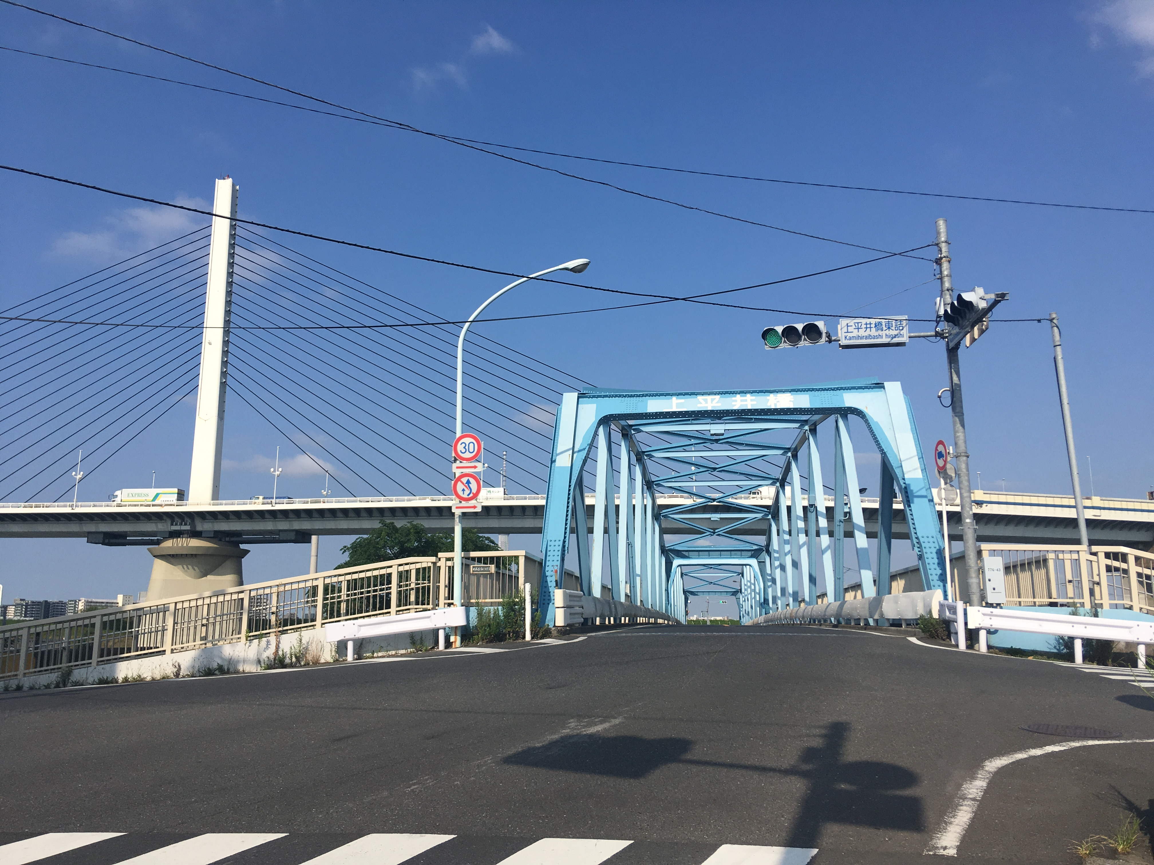 東京都葛飾区にある上平井橋の東詰